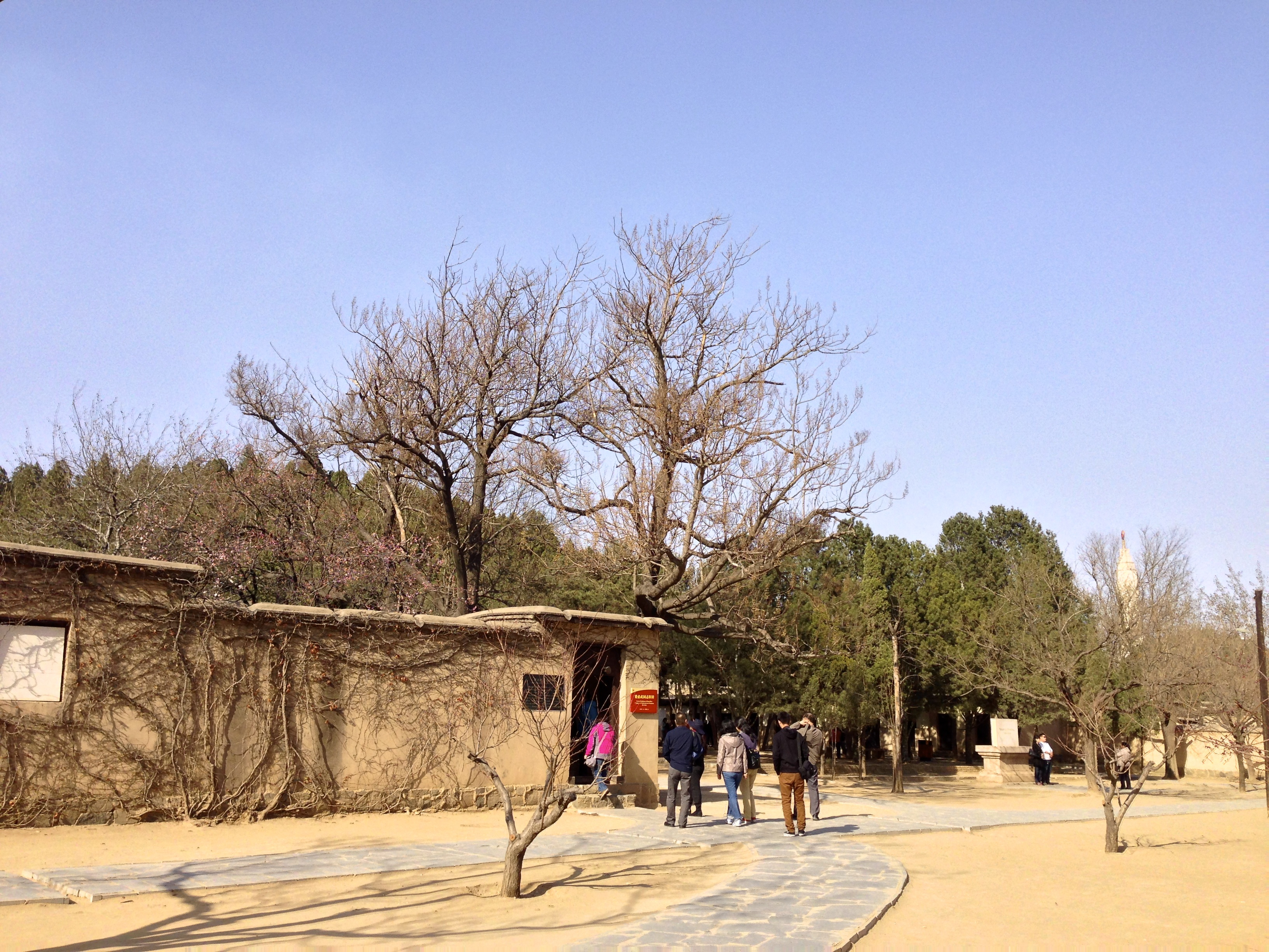 西柏坡舊址